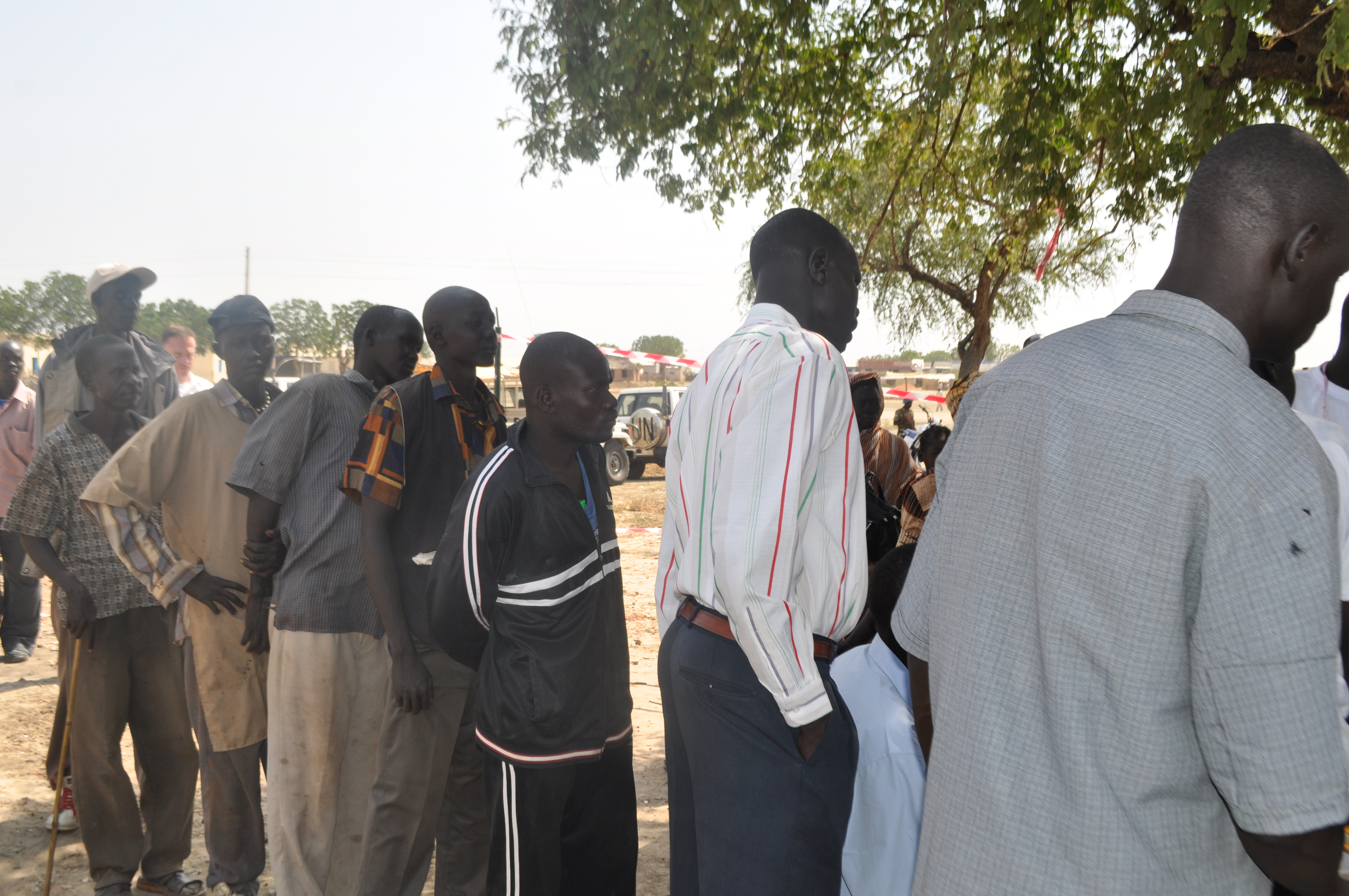 Folks line up to register to vote in Abyei.